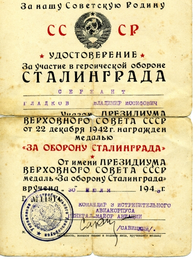 Наградная грамота